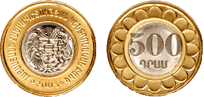 500 Dram (2003)